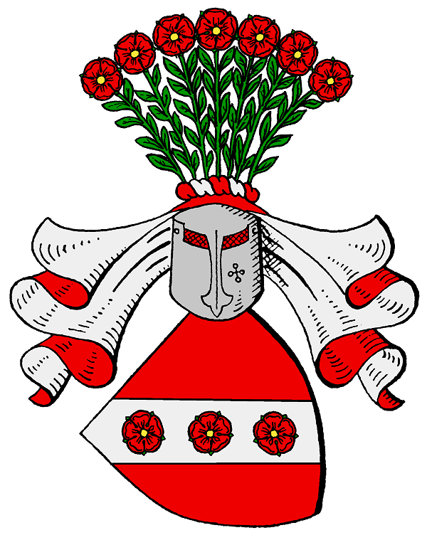 Stammwappen derer von Rotermund.